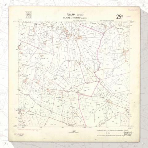 Tukuma apriņķa Irlavas un Praviņu pagastu plāns – 1937. gads.